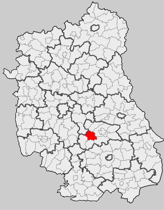 Map of gmina Gorzków, Krasnystaw county, Lublin voivodship Mapa gminy Gorzków, powiat krasnostawski, województwo lubelskie